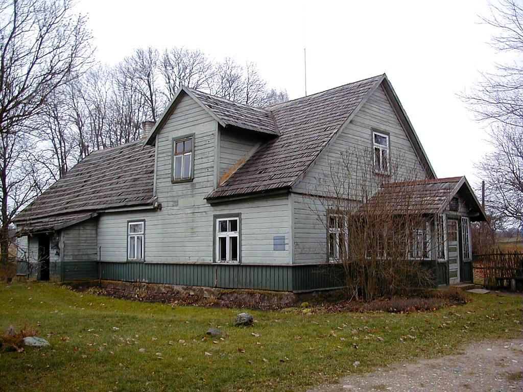 Dzirciems, E. Birznieka-Upīša muzejs "Bisnieki" 1999-11-27